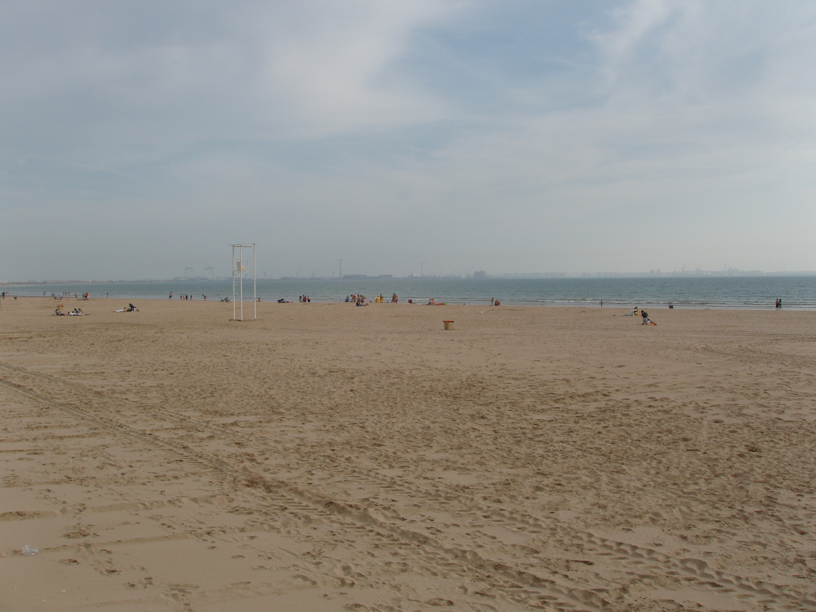 Playa de Valdelagrana en El Puerto de Santa María (Cádiz, España)